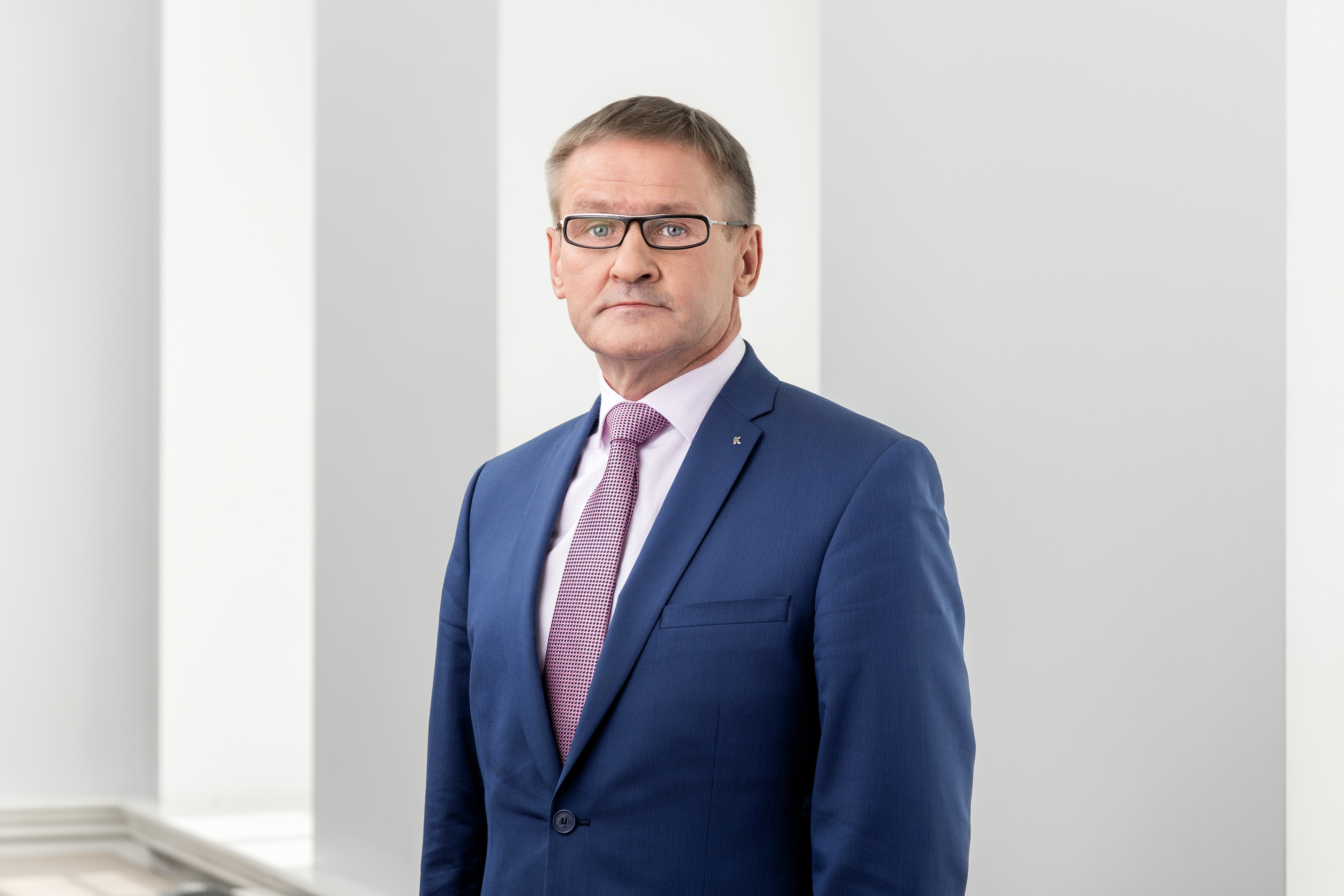 Jaak Aab